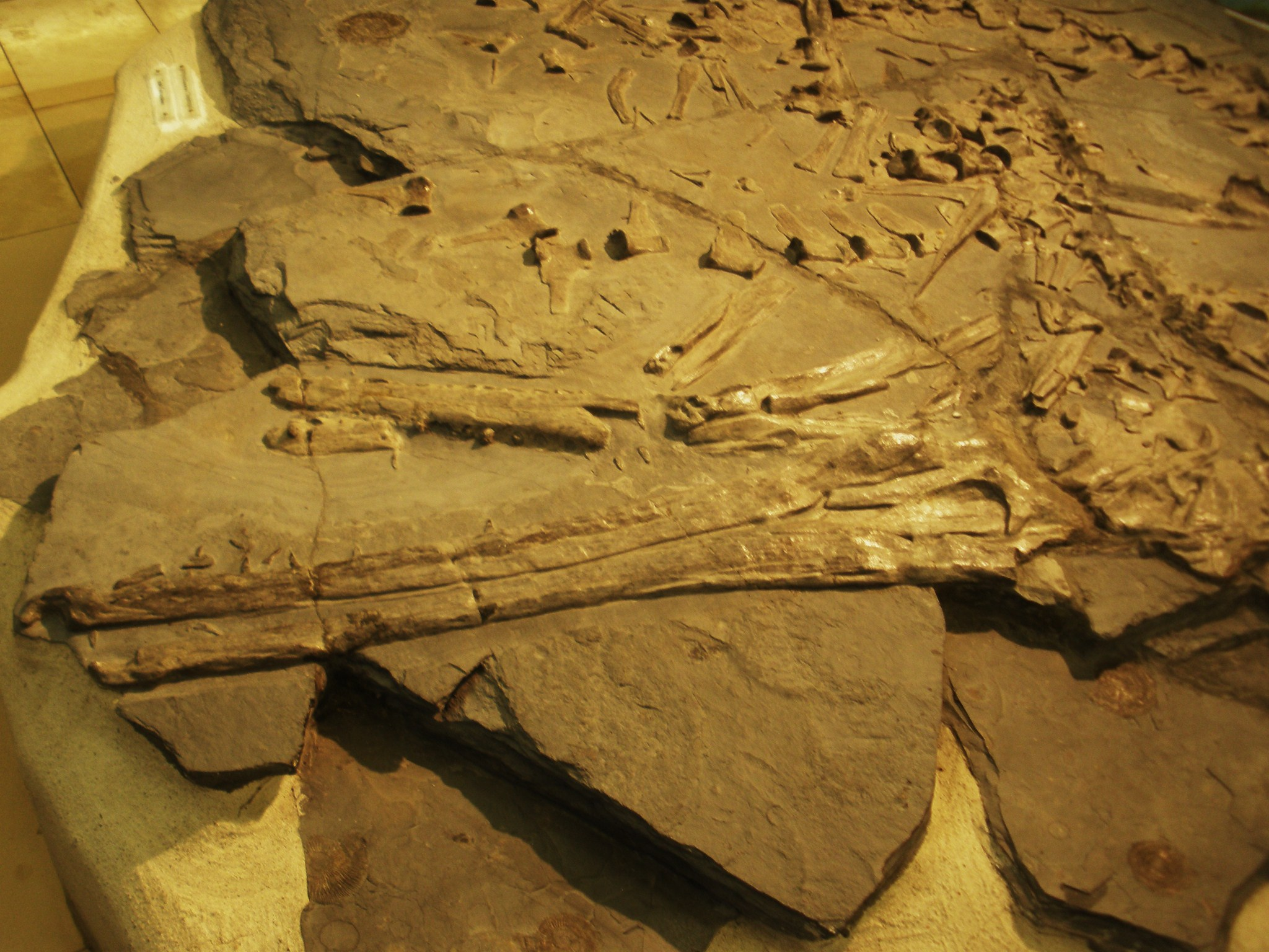 Fossil of Mystriosaurus, an extinct reptile